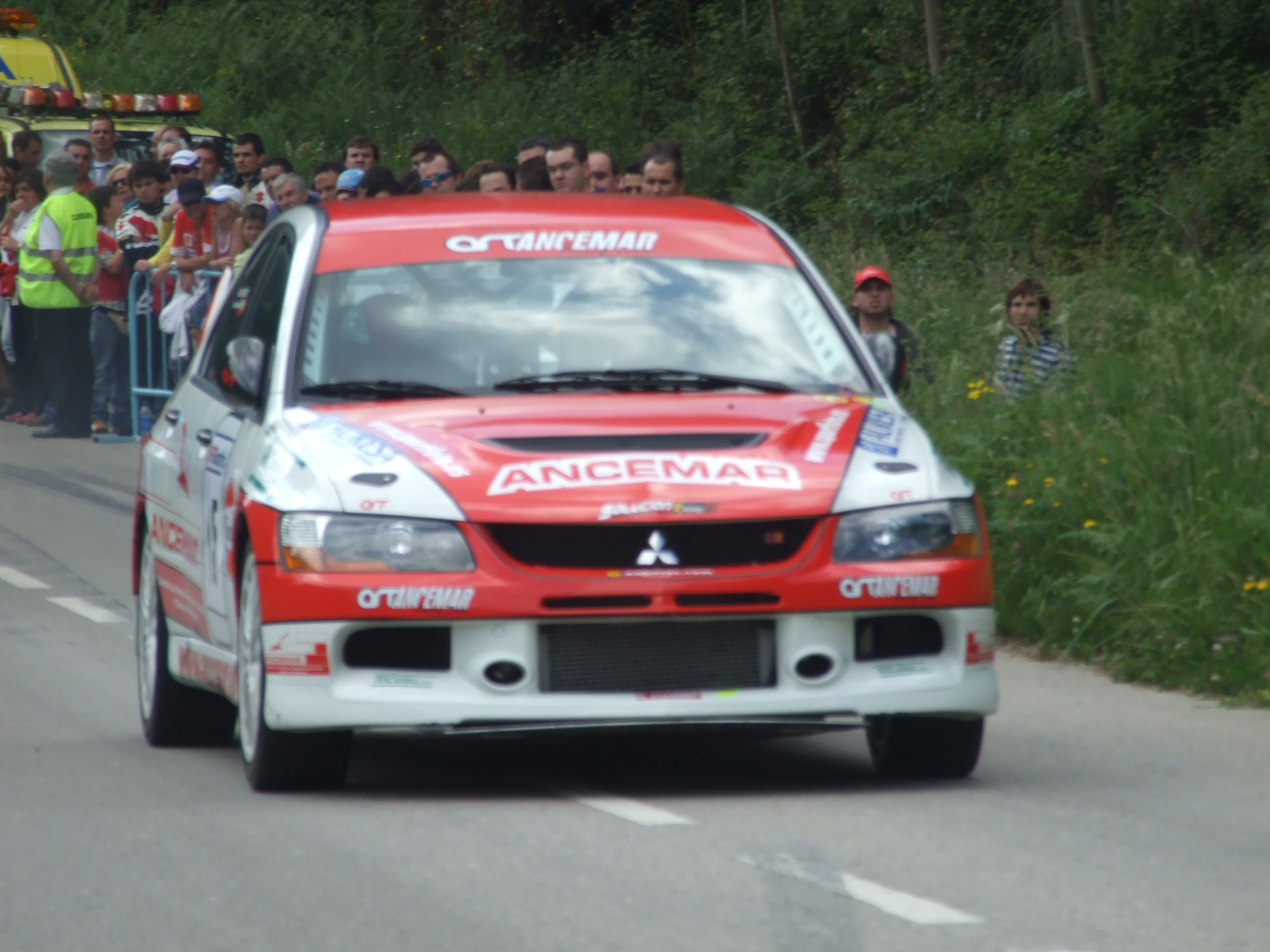 Imagen de Mario Ceballos con Mitsubishi Lancer Evo IX en el regional Cántabro de Rallyes en el año 2008